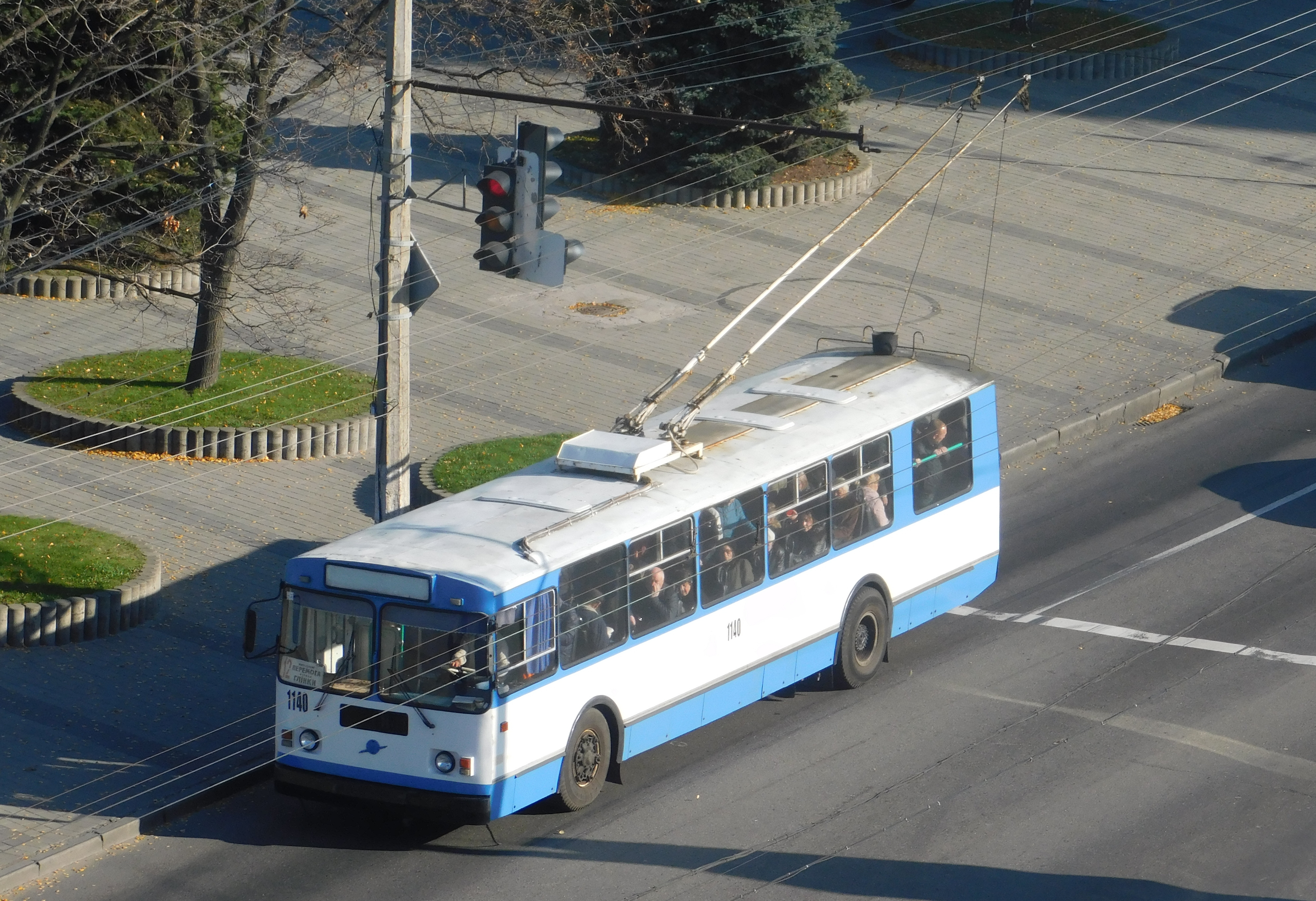 ЗІУ-9 -1140, front